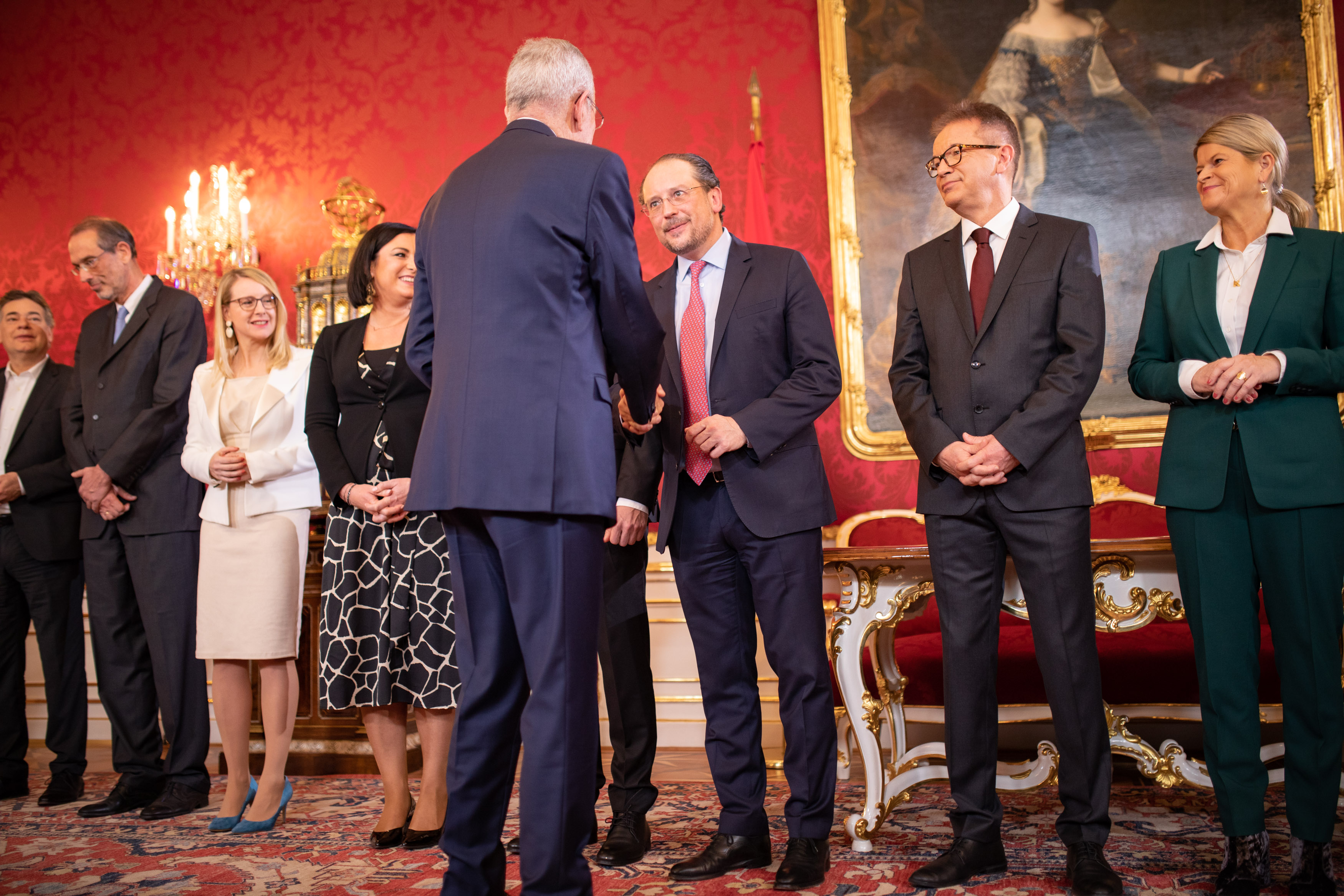 GLJ_3496